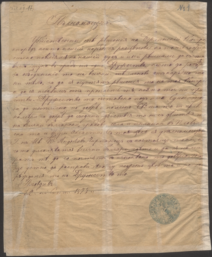 Пълномощно от Пловдивския комитет Единство на Иван Андонов. Документът е собственост на Регионален исторически музей Пловдив. Оригиналът е представен в експозиция "Съединение на България 1885 г." на РИМ-Пловдив на адрес Пловдив, пл."Съединение" №1.